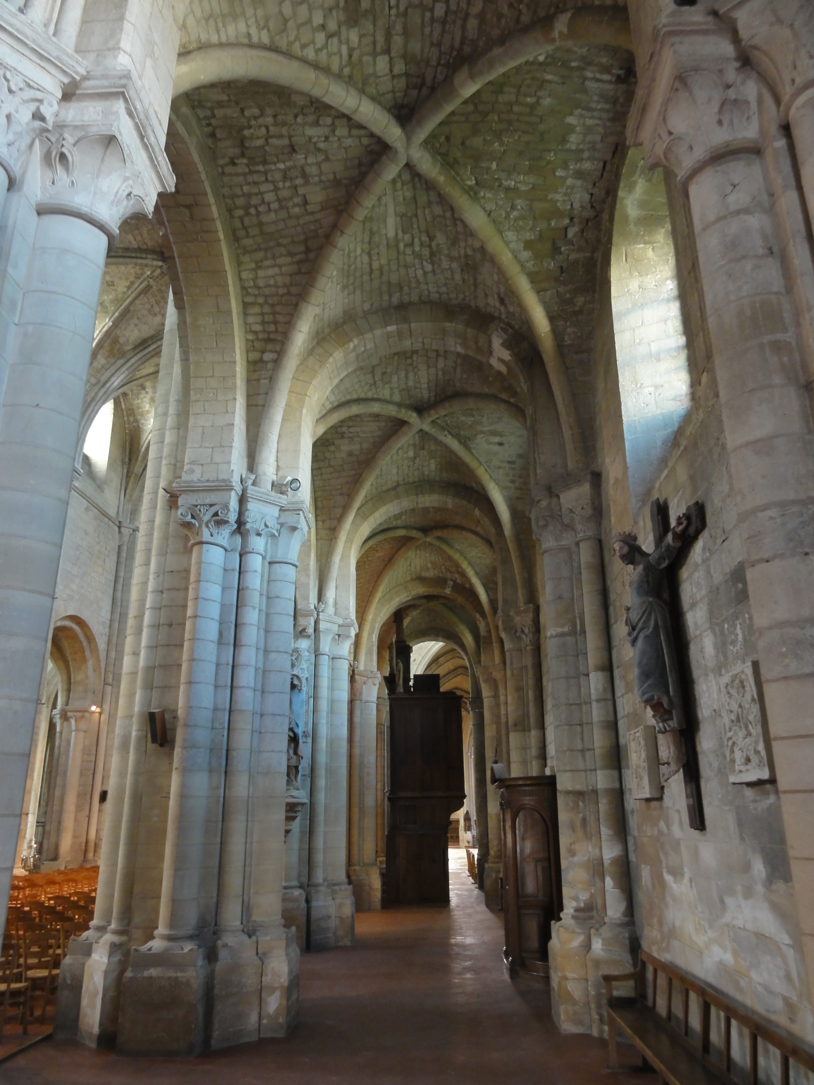 Bas-côté sud, vue vers l'est.